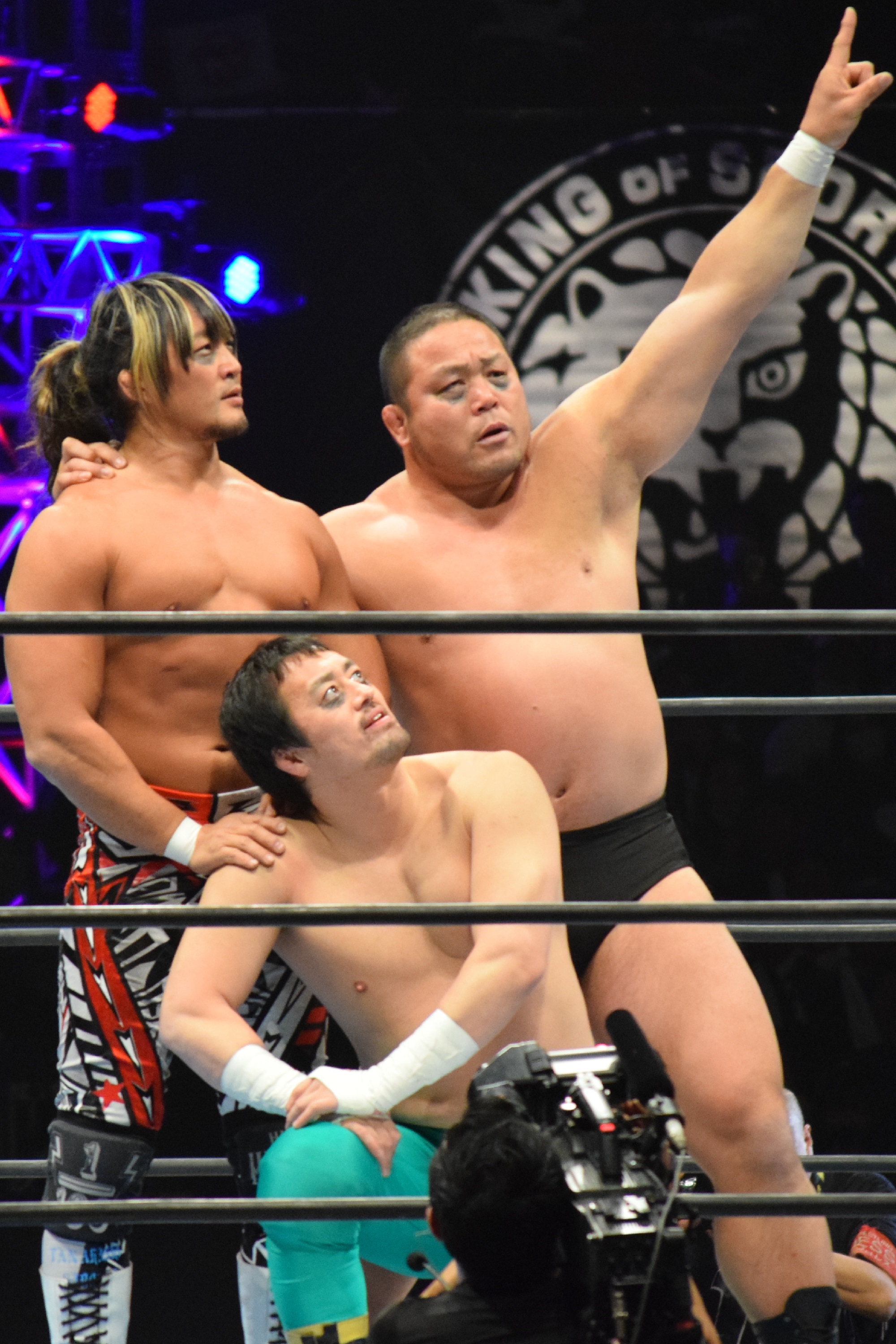 2017年2月11日 大阪府立体育会館 「THE NEW BEGINNING in OSAKA」 タグチジャパン（棚橋弘至 & 中西学 & 田口隆祐）